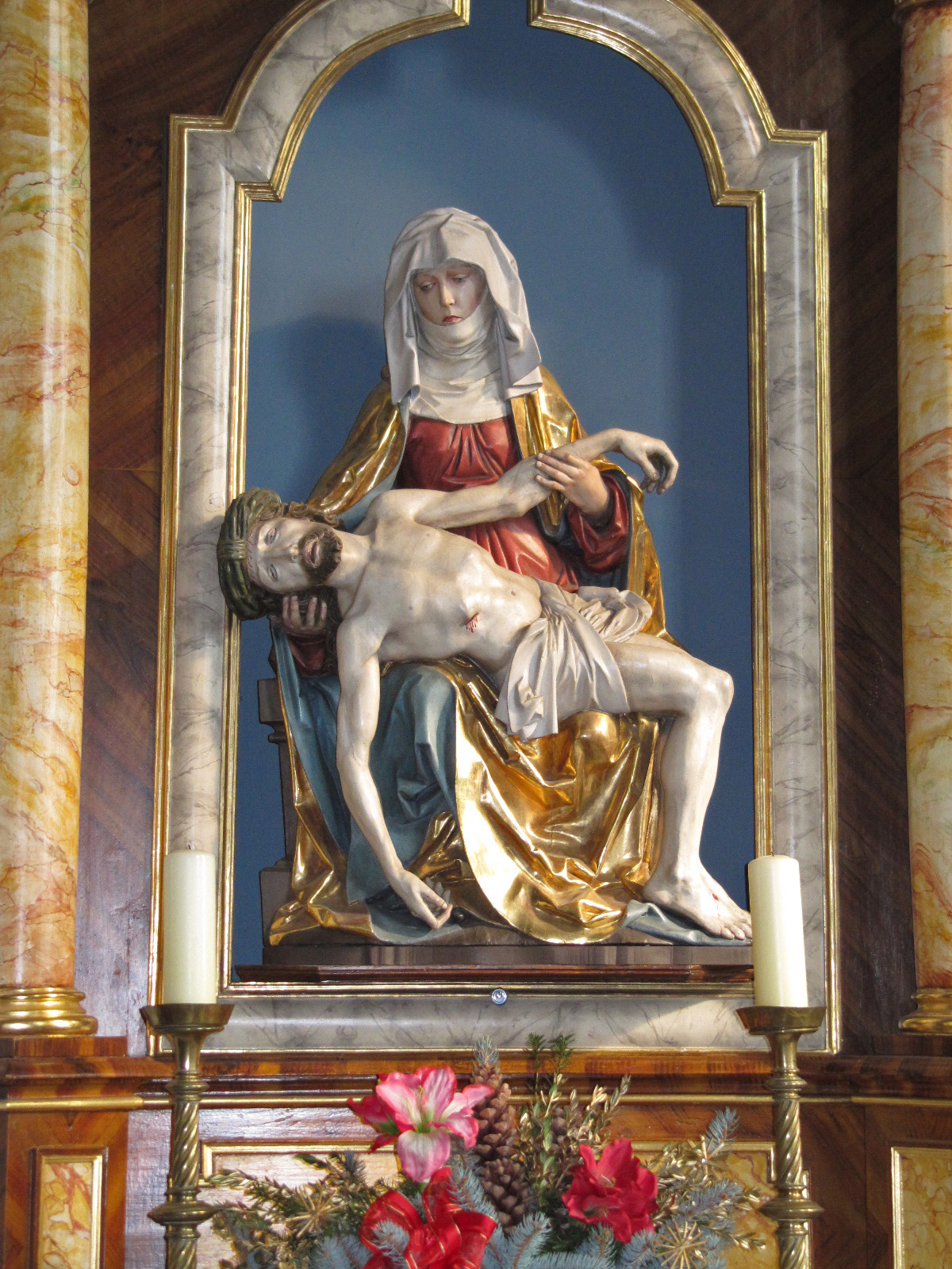 Pieta, vermutlich ein Kunstwerk Riemenschneiders